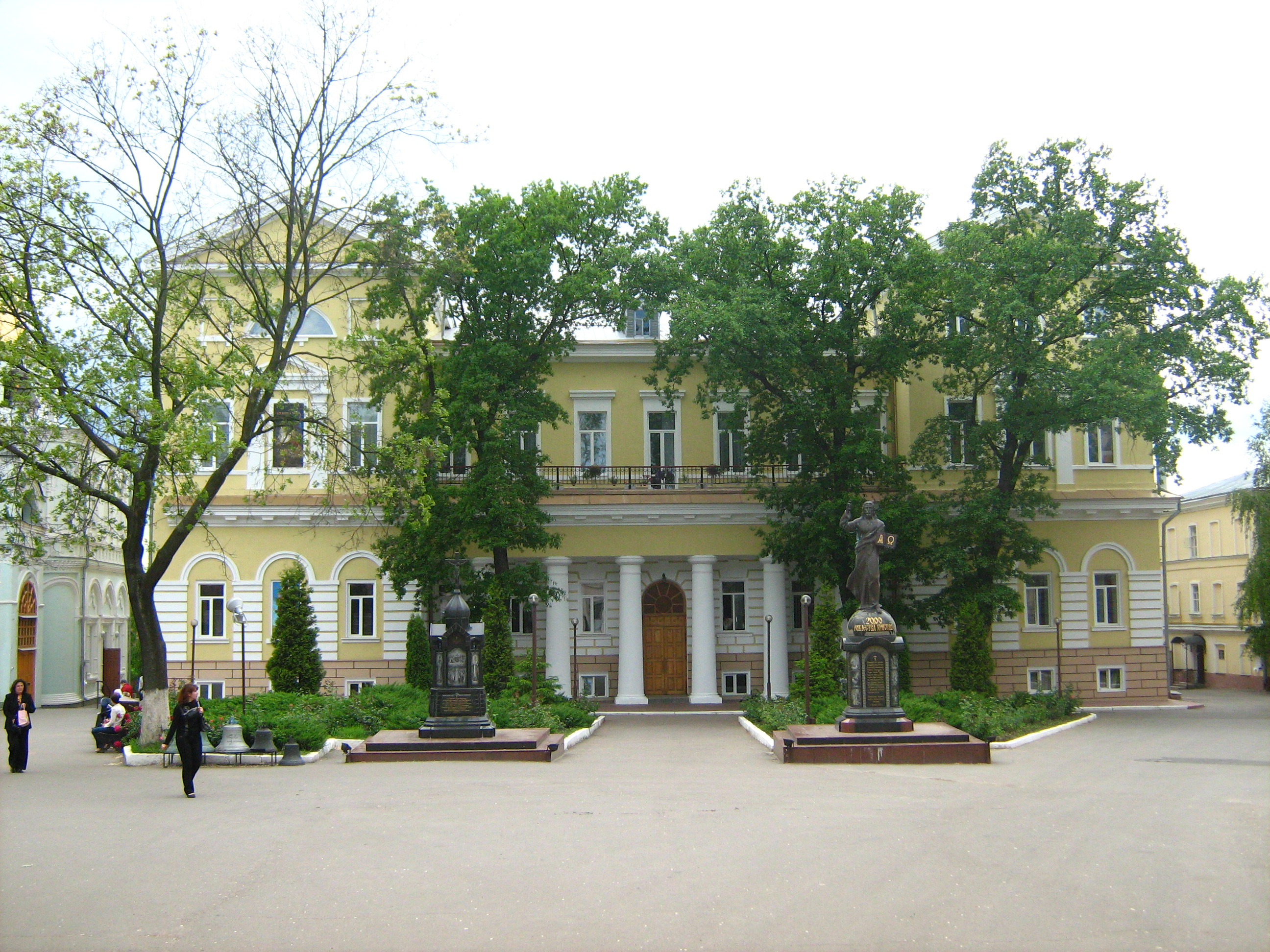 Резиденция митрополита Харьковского и Богодуховского (Архиерейский дом). Памятник архитектуры 18 века. Территория Покровского монастыря в Харькове. На фото не Покровский собор. Это не церковь. Перед зданием установлен Памятник 2000-летию христианства (Иисусу Христу).